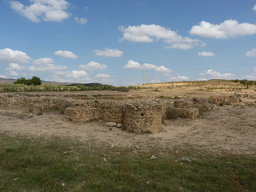 réservoir (initial romain, repris aghlabide)